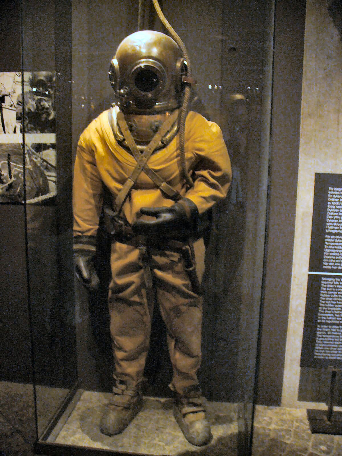 A vasa hajo kiemelesenel hasznalt eredeti buvarruha. Sajat digitalis kamera. --Math 2005. október 18., 17:52 (CEST) hivatkozando forras: Brendel Matyas